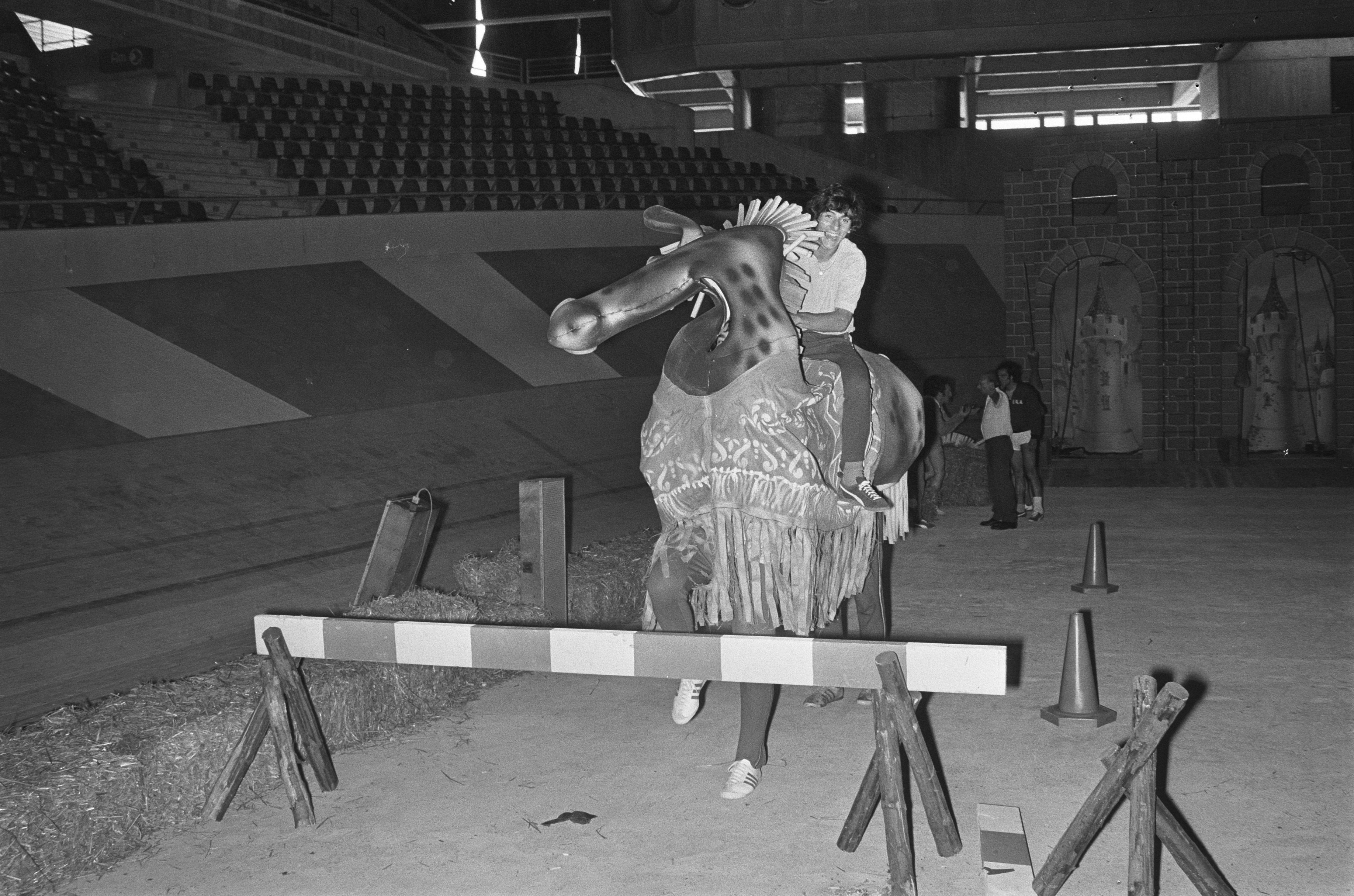 Collectie / Archief : Fotocollectie Anefo Reportage / Serie : [ onbekend ] Beschrijving : Televisiespel "Spel zonder grenzen" in Rotterdamse Sportpaleis, training, Italiaanse ploeg traint Datum : 6 juli 1971 Locatie : Rotterdam, Zuid-Holland Trefwoorden : Televisiespellen Fotograaf : Peters, Hans / Anefo Auteursrechthebbende : Nationaal Archief Materiaalsoort : Negatief (zwart/wit) Nummer archiefinventaris : bekijk toegang 2.24.01.05 Bestanddeelnummer : 924-7089